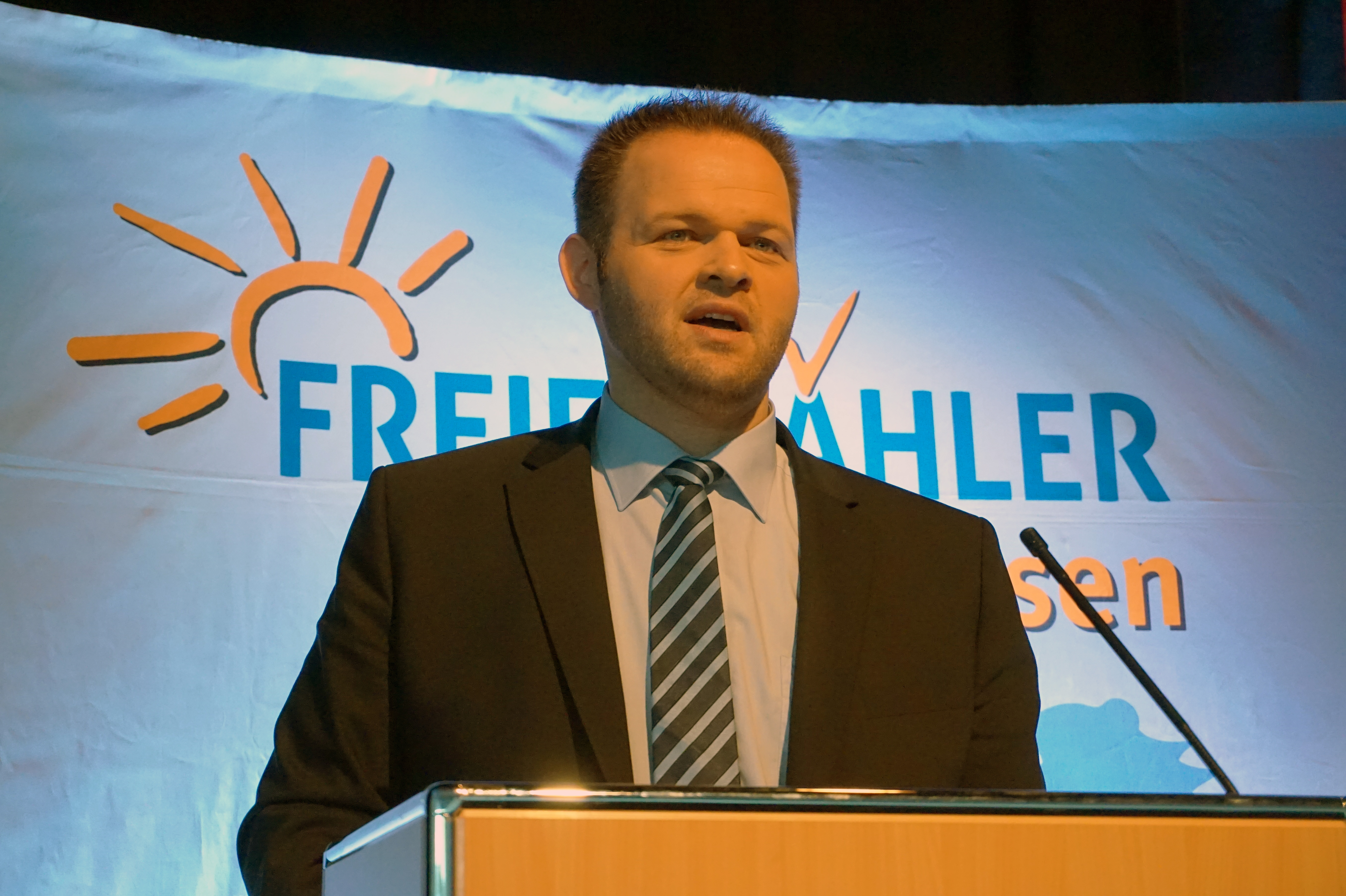 Engin Eroglu, Landesvorsitzender der FREIE WÄHLER Hessen, bei der Landesmitgliederversammlung 2018 in Friedrichsdorf.